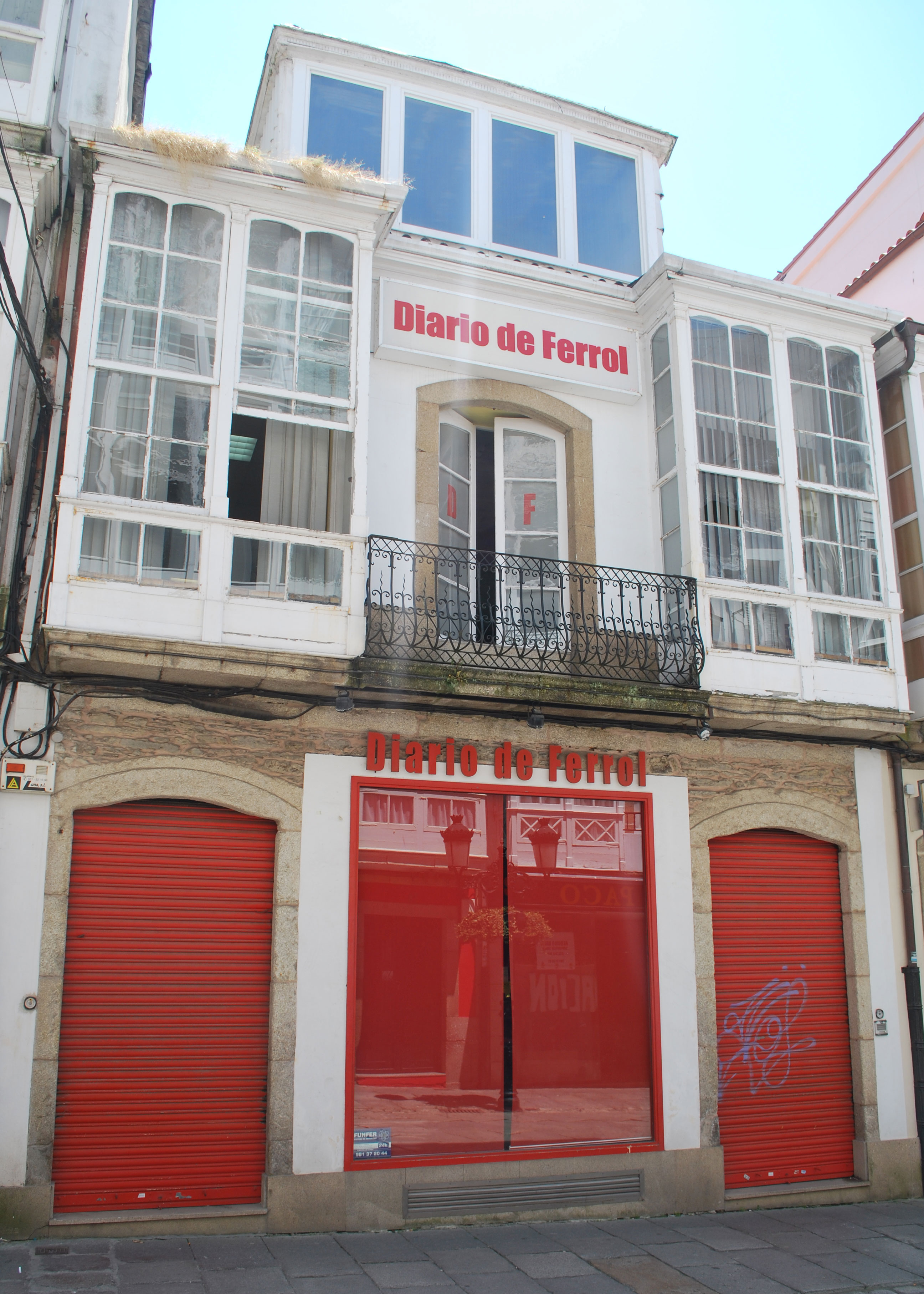 Sede de Diario de Ferrol na rúa Galiano A Coruña Galiza Spain